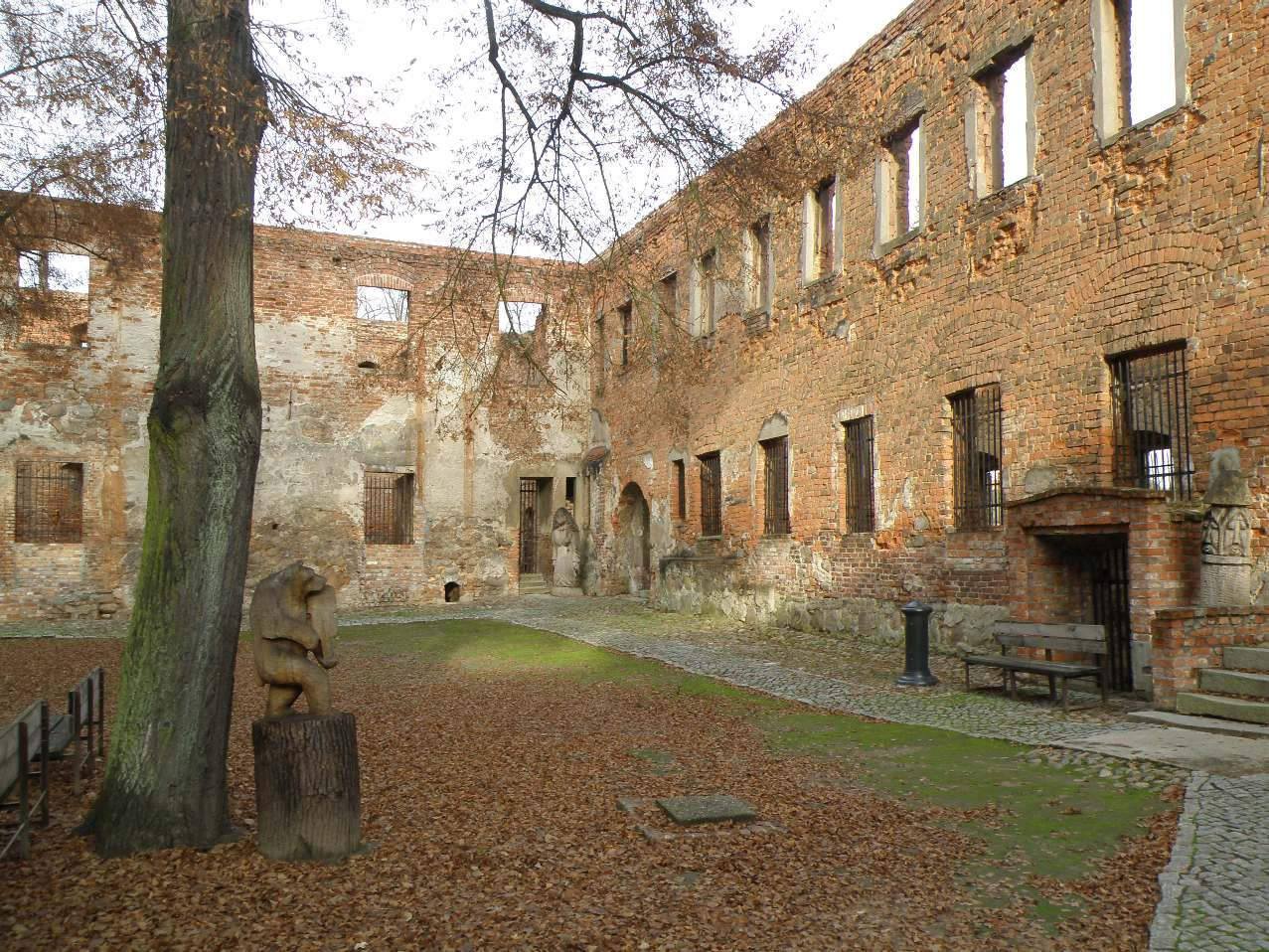 zamek w Krośnie Odrzańskim - dziedziniec